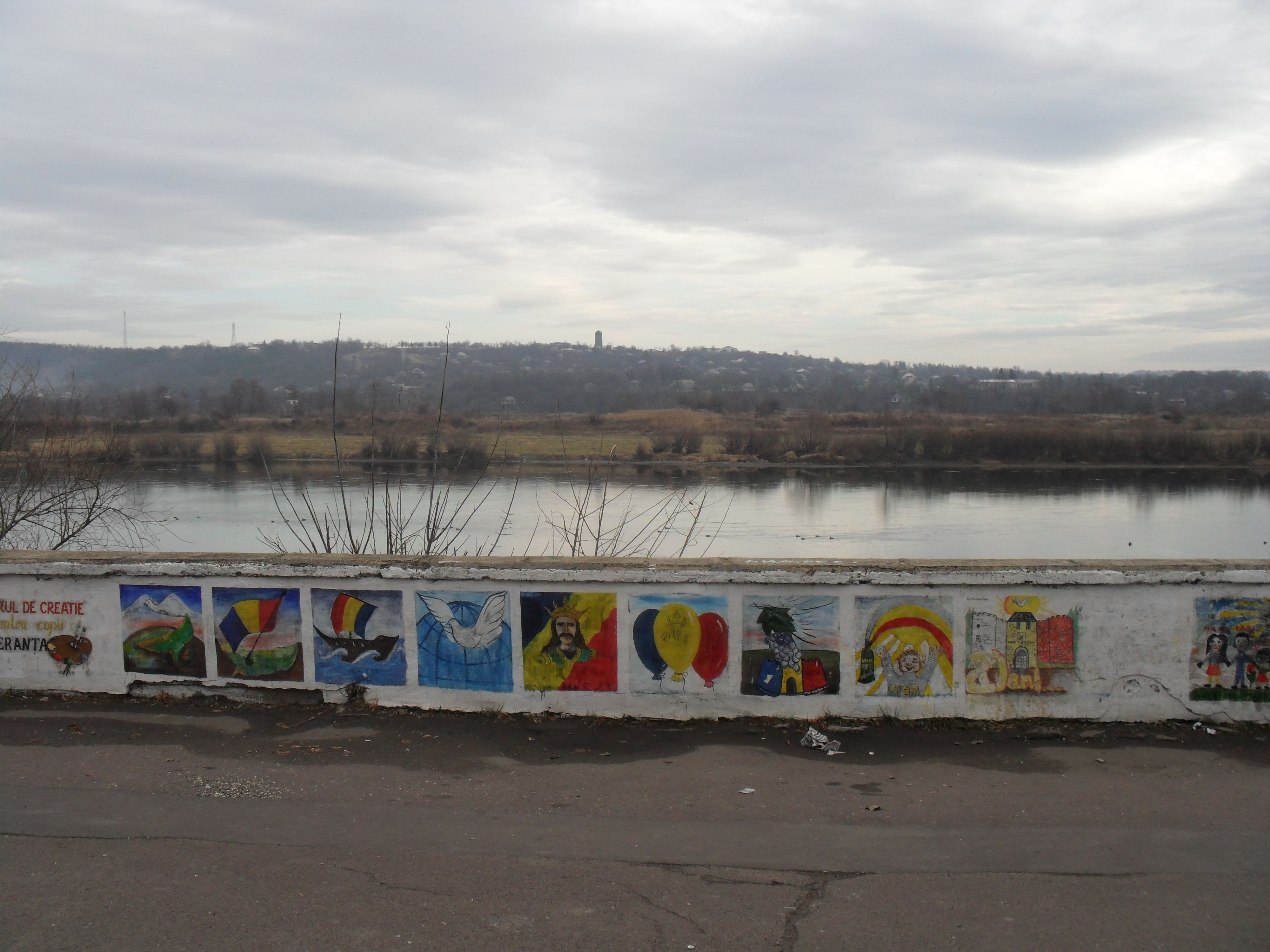 Набережна поблизу Сороцької фортеці